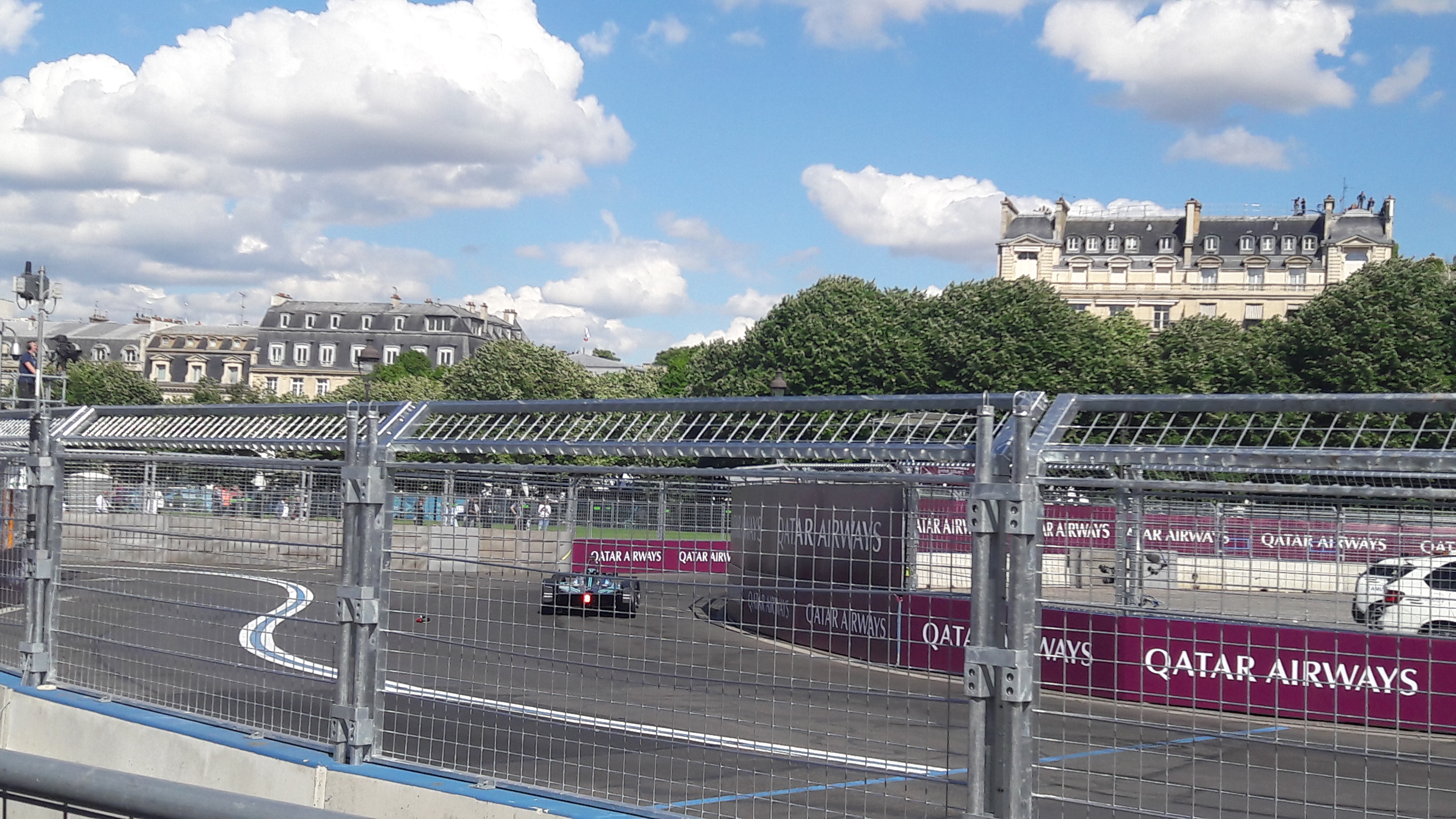 Course du FIA 2016–17 Formula E season, Paris eprix 2017